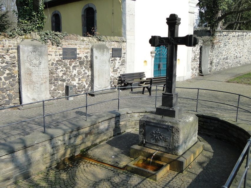 Das Wegekreuz wurde am Brunnen des Adelheidisplatz 1959, in den alten Formen, errichtet. Die alte Jahreszahl 1684 wurde bei der Neuschaffung nicht übernommen. Die Initialen P.B. stehen für den Geistlichen Rat Peter Breideneich, den damaligen Pfarrer von Pützchen.Inschrift: Jahreszahl an der rechten Sockelseite mit den Initialen P.B. Auf der Rückseite des Sockels das Steinmetzzeichen FW.